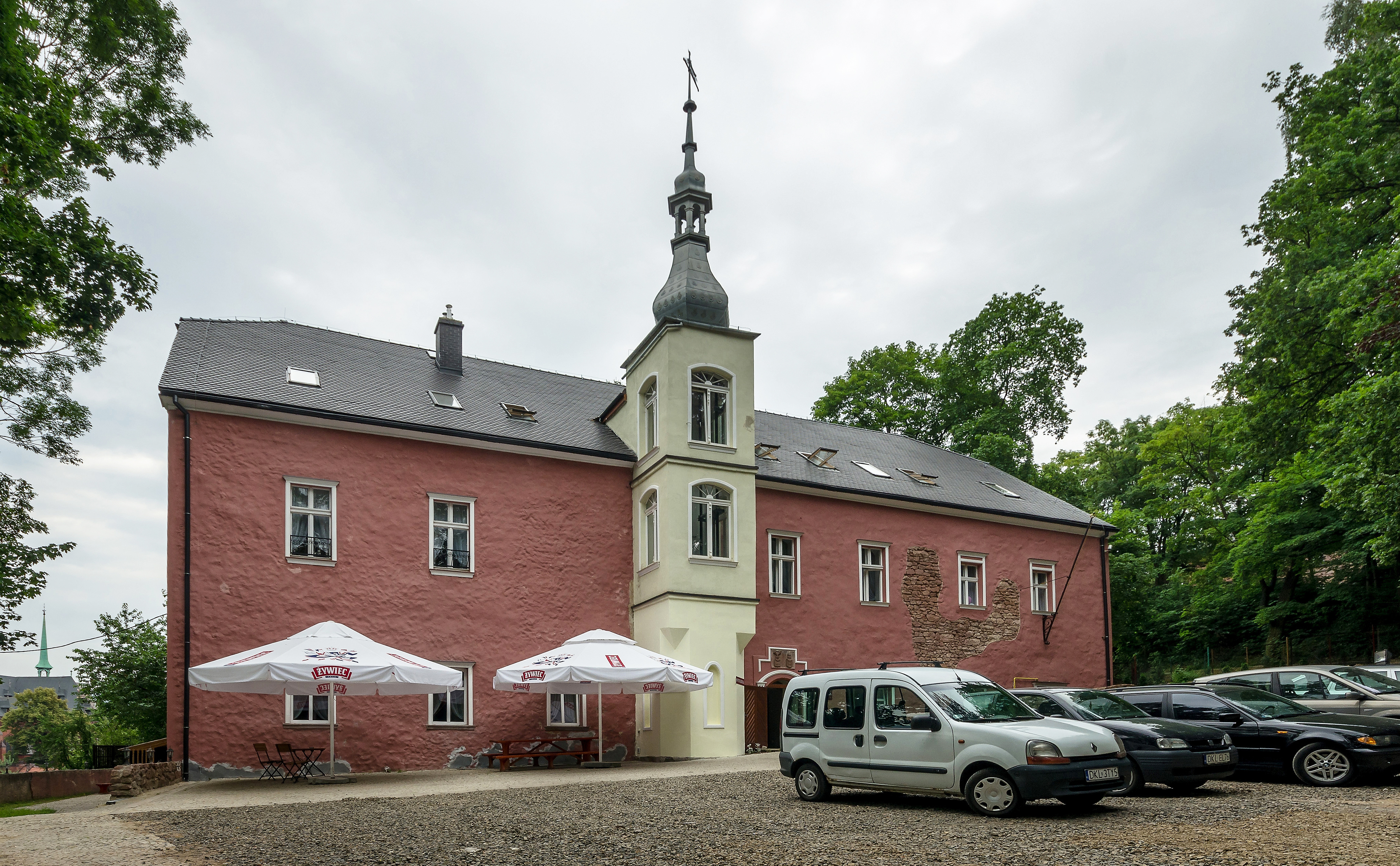 Nowa Ruda, Dwór Górny, ob. hotel, XVII, XIX This photo of Lower Silesian Voivodeship was taken during Wikiexpedition 2013 set up by Wikimedia Polska Association. You can see all photographs in category Wikiekspedycja 2013.